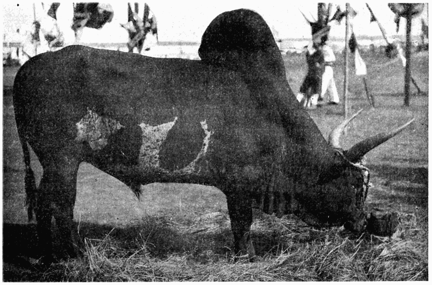 zébu de Madagascar (Bibos radicus)